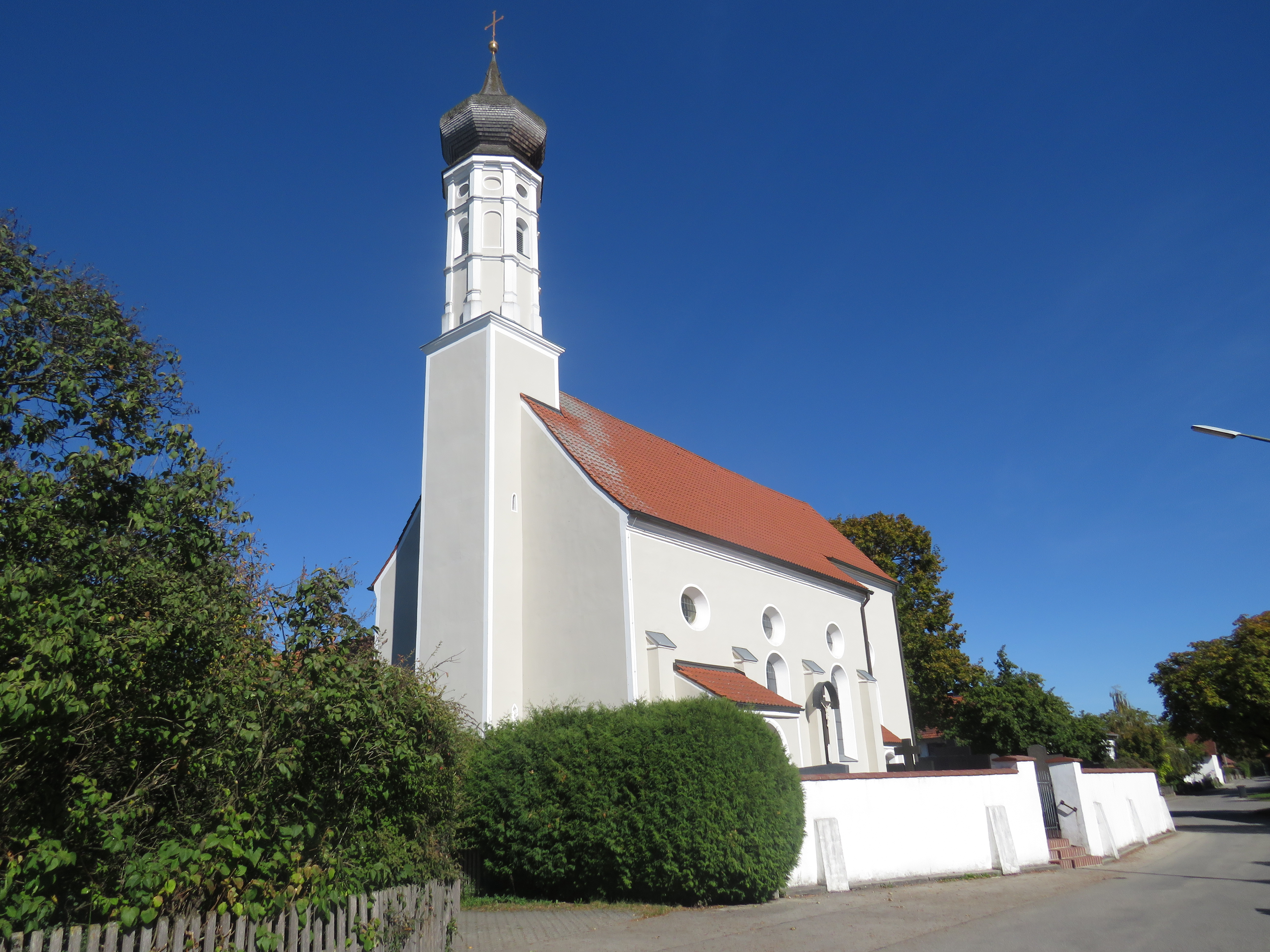 St. Andreas (Niederlern)